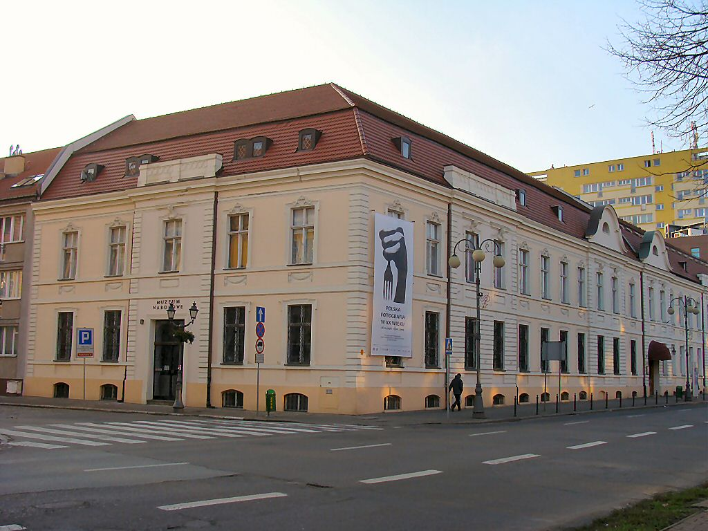 Szczecin - Pałac pod Głowami